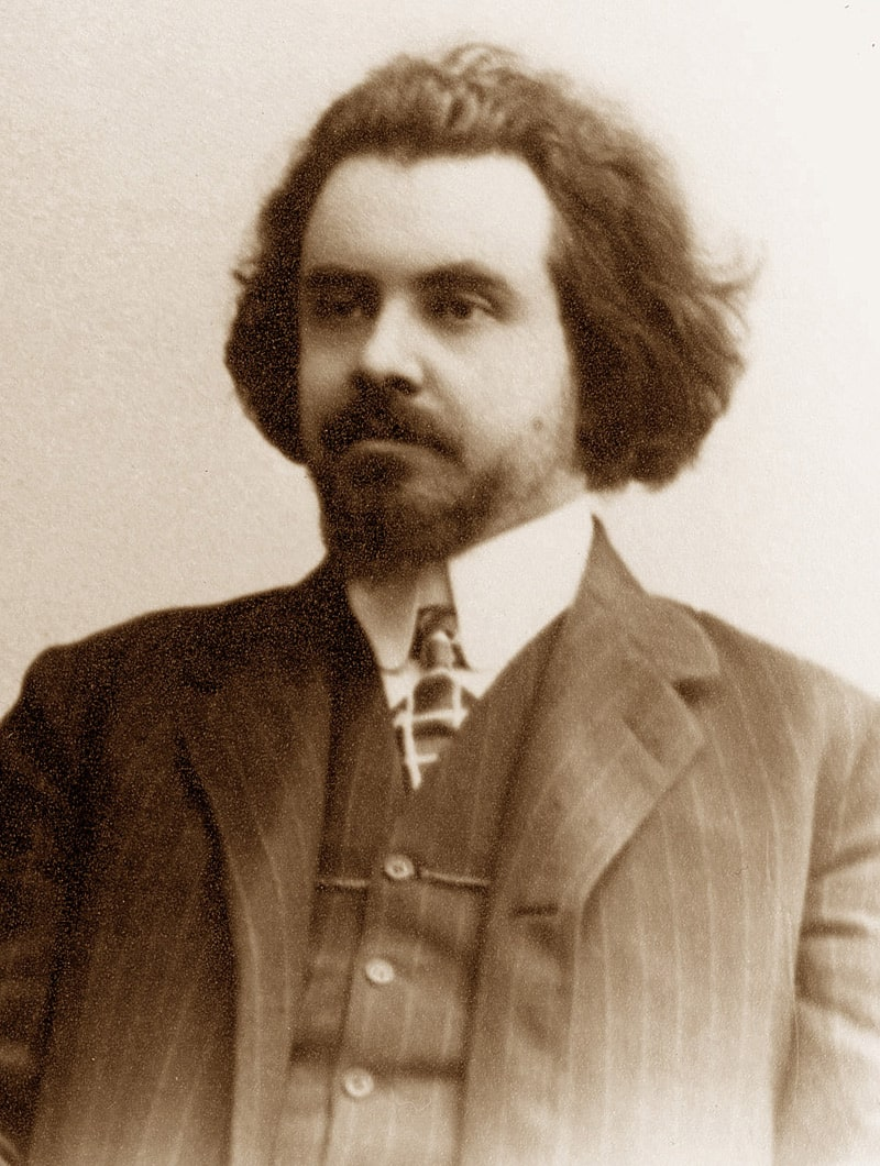 Русский религиозный философ Николай Бердяев